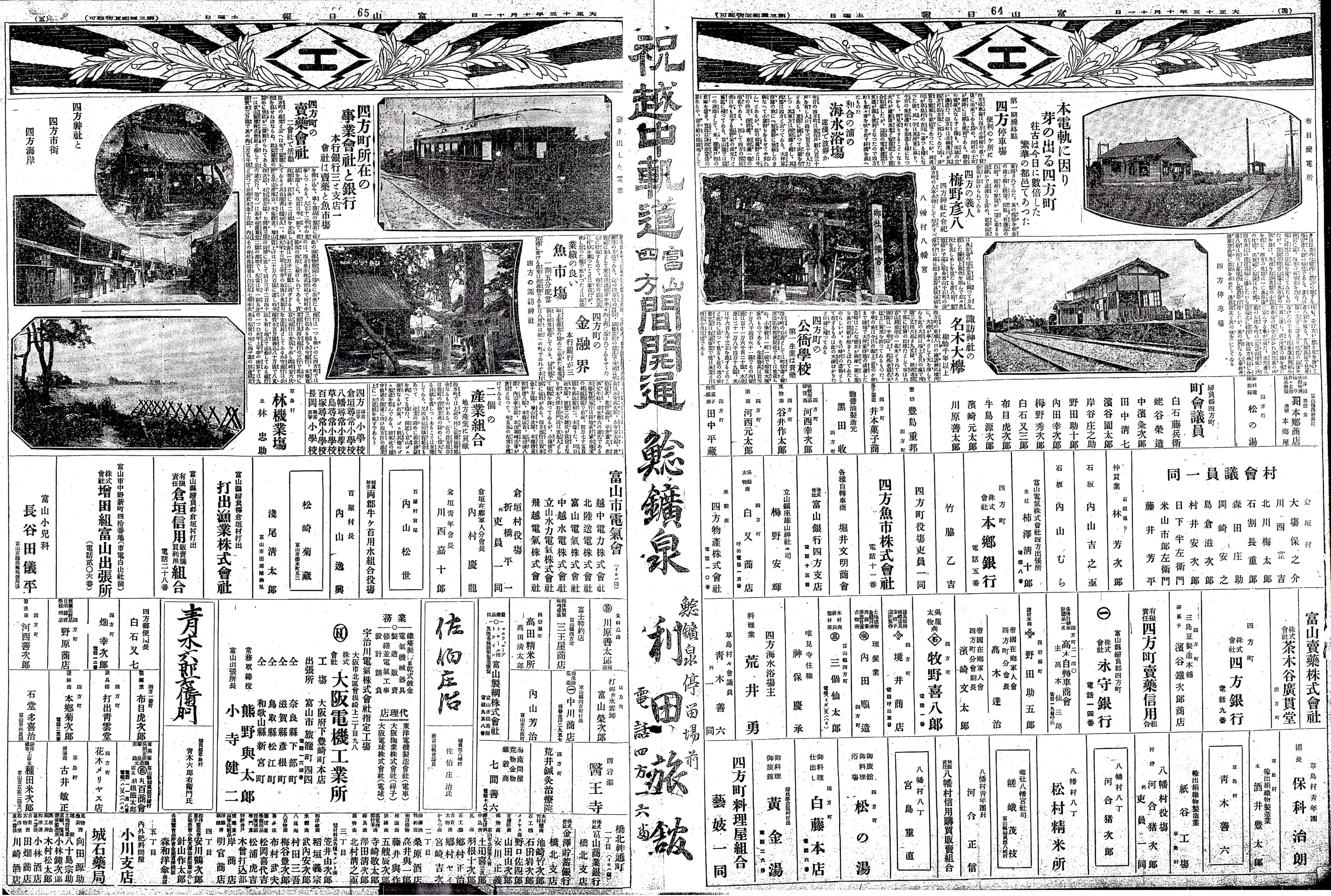 越中電気軌道線富山北口停留場 - 四方停留場間開業